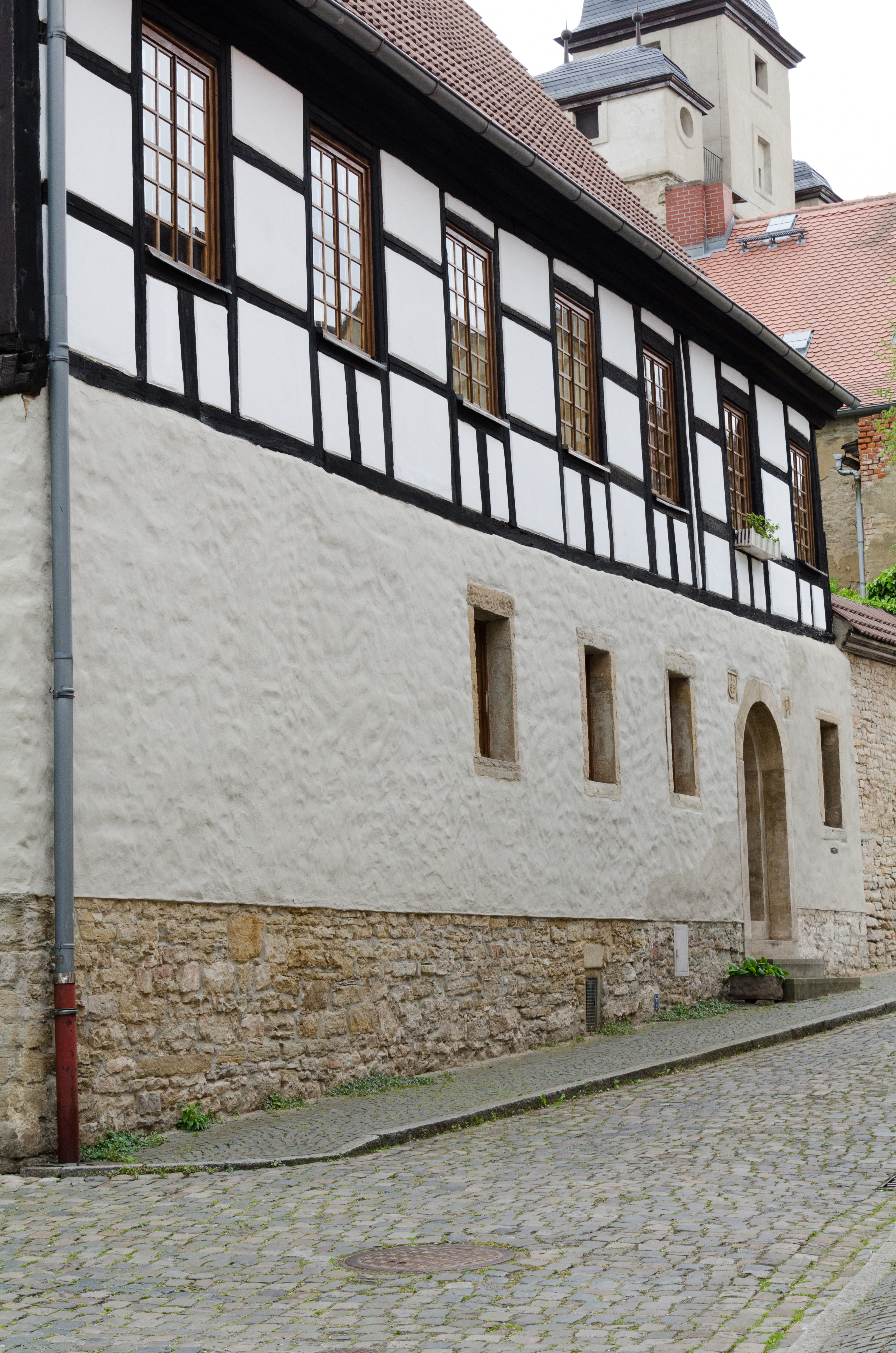 Zeitz, Ritterstraße 1